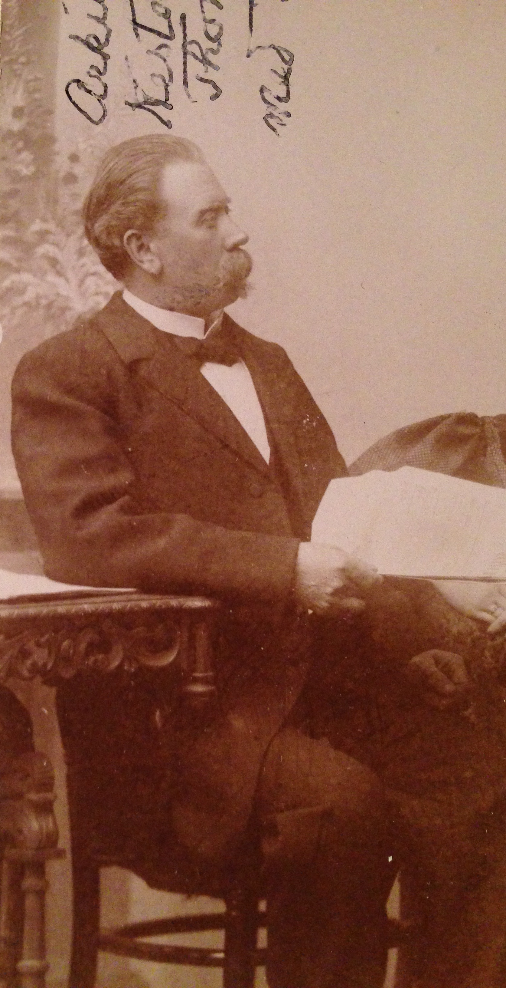 Bildet viser arkitekt Nestor Georgius Thommasen, fotograf mest sannsynlig T.N.Mykleby